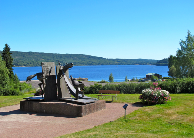 Minnesmärket över Ådalshändelserna i Lunde i Kramfors kommun skapat av Lenny Clarhäll (1979-81)